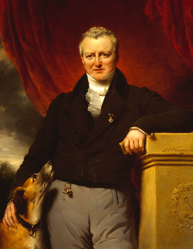 schilderij; Amsterdam; portret; portret Amsterdam; mansportret; Hoop, Adriaan van der